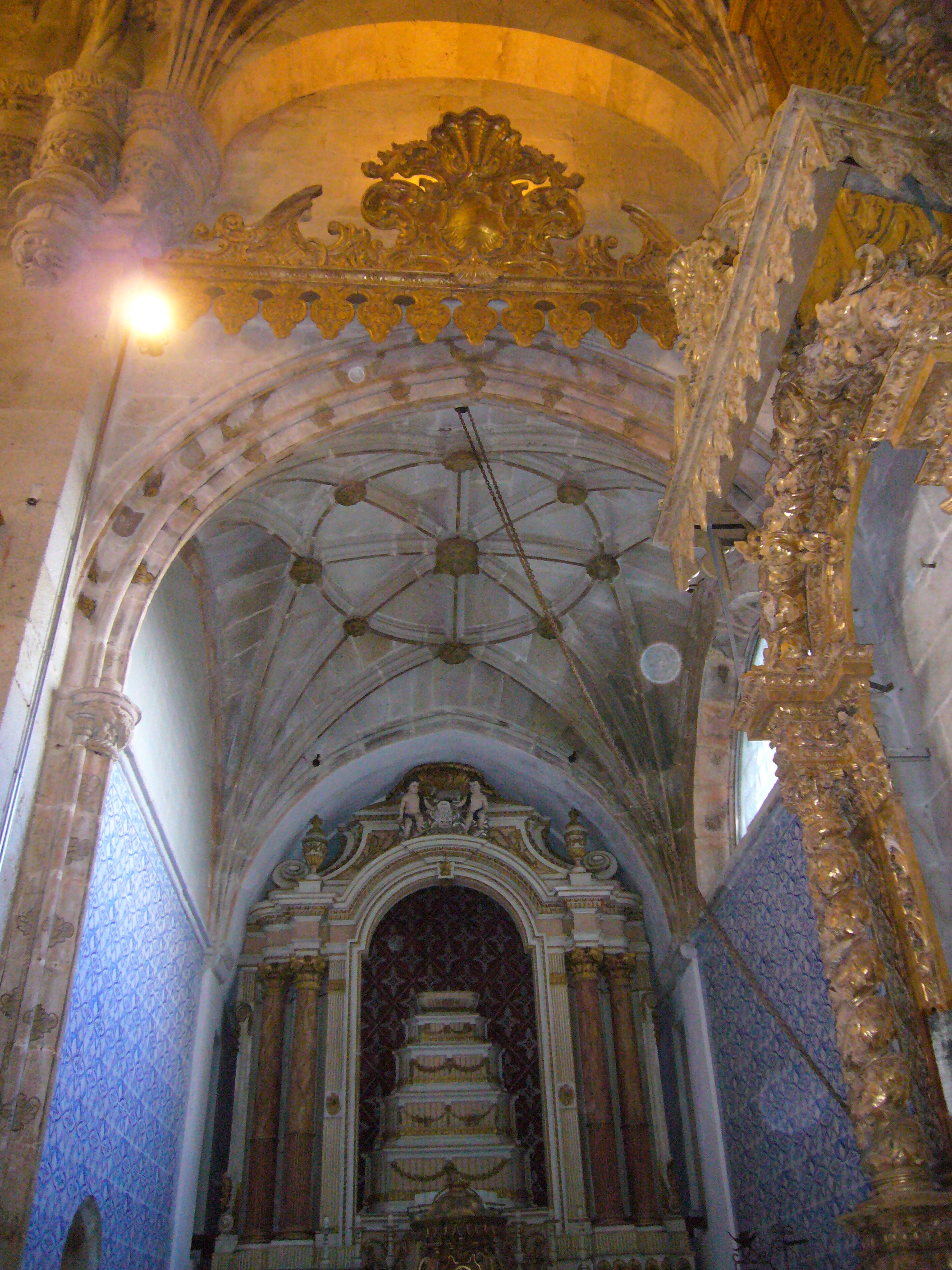 Capela colateral do lado do Evangelho, Vilar de Frades